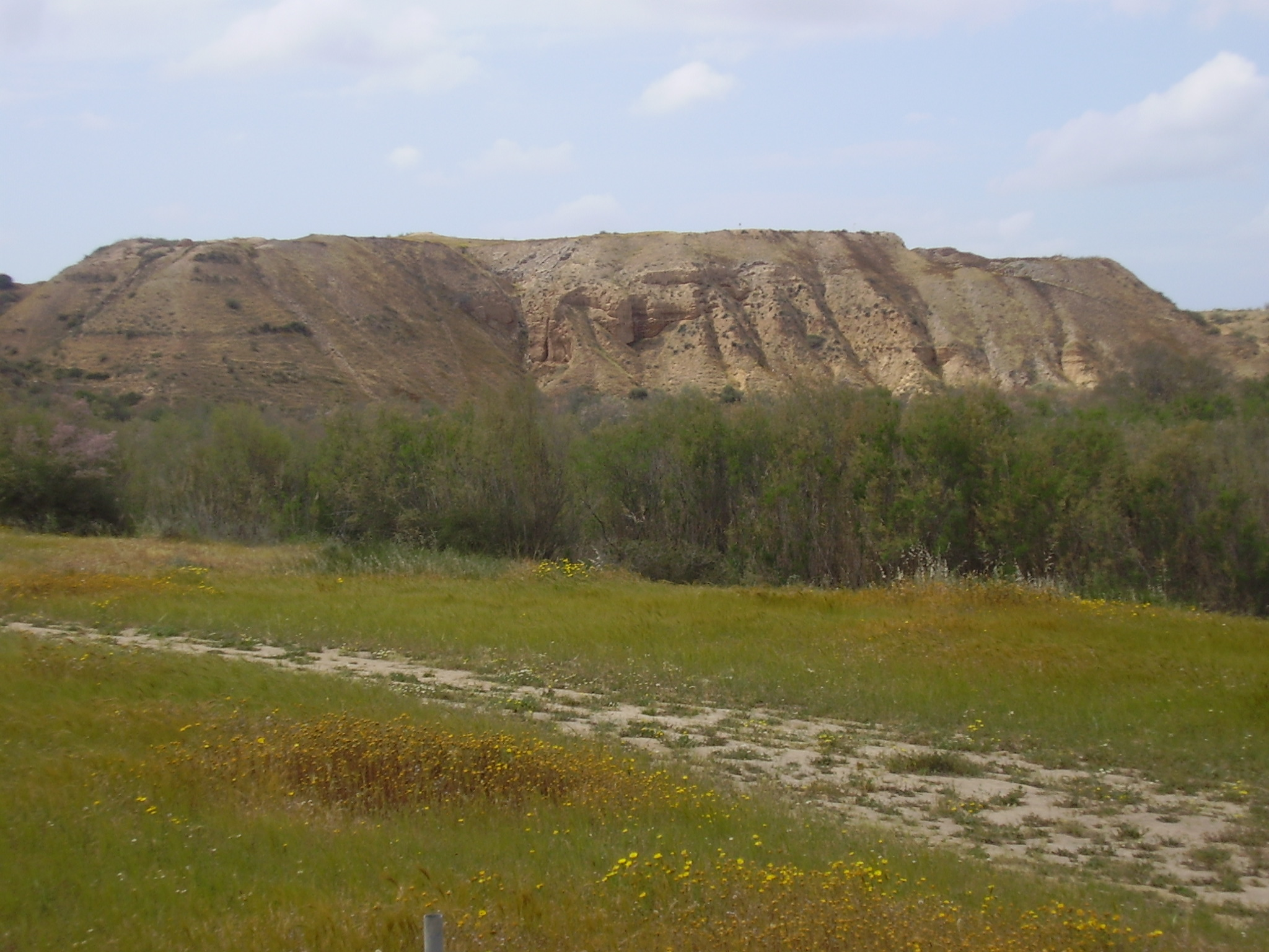 Tell el-Farah South a view from east